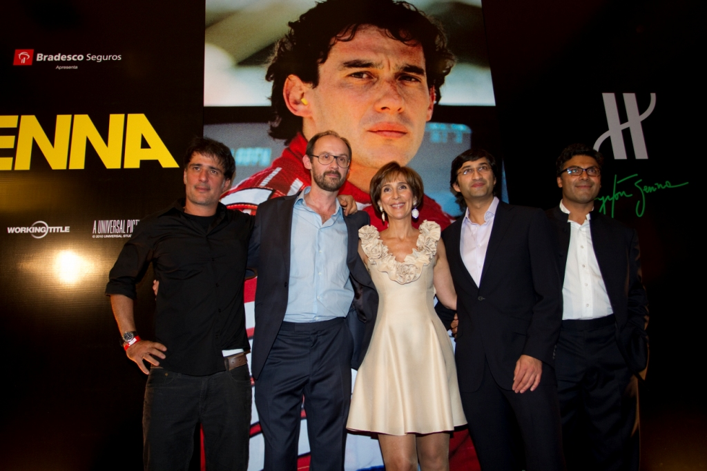 Antônio Pinto (Trilha Sonora), James Gay-Reels (Produção), Viviane Senna, Asif Kapadia (Direção) e Manish Pandey (Roteiro). (Foto: Carina Zaratin)